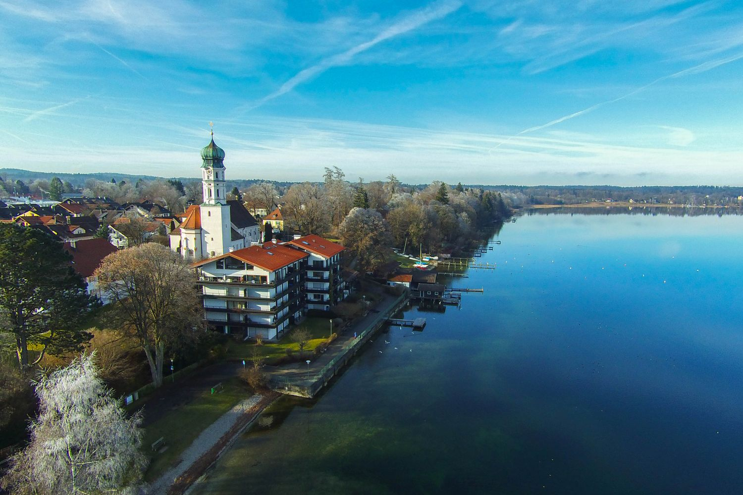 Dieses Luftbild zeigt die Ortschaft Seeshaupt am Starnberger See mit der Kirche St. Michael.